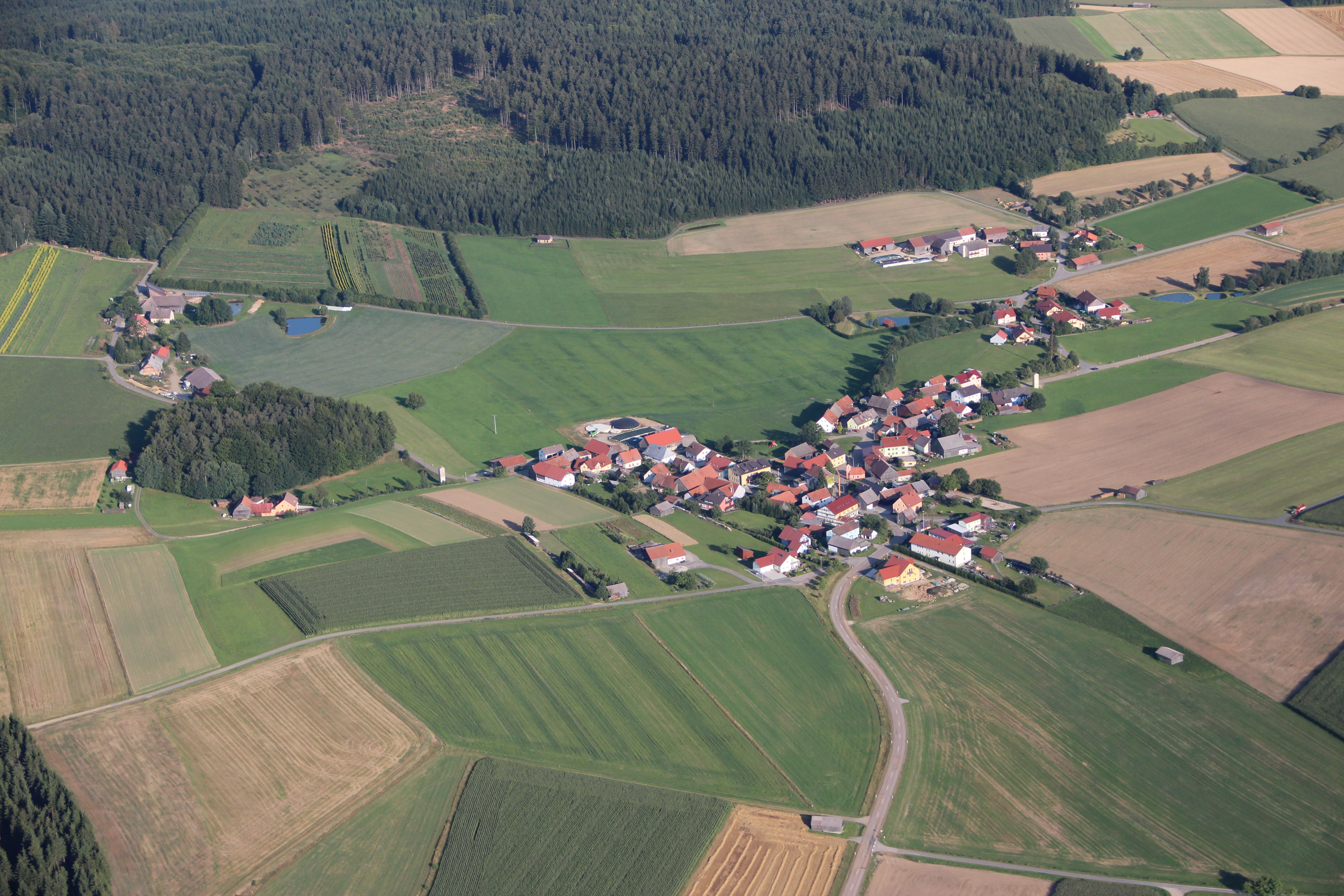 Wildstein, am linken Bildrand Ödreichersried,Gemeinde Teunz, Landkreis Schwandorf, Oberpfalz, Bayern (2012)